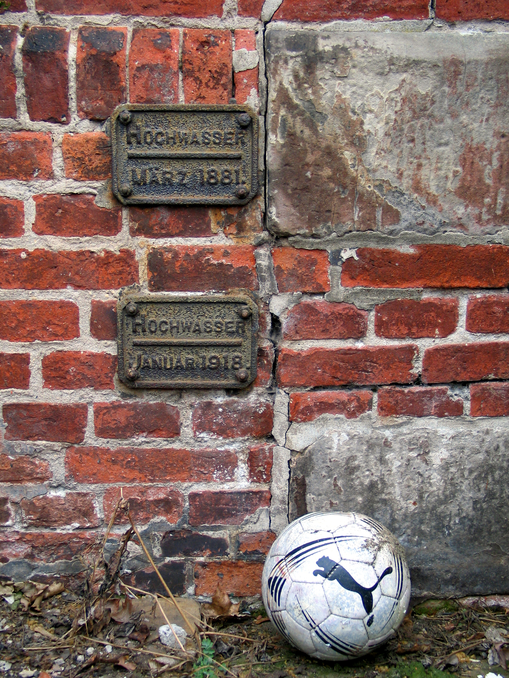 Hochwassermarken auf der Rückseite der Herrenmühle in Celle, hier vom März 1881 und vom Januar 1918. Die ehemalige Herrenmühle steht unmittelbar neben der Walzenwerk-Anlage in Celle, unter der heutigen Adresse Torplatz 1 und 1b ...